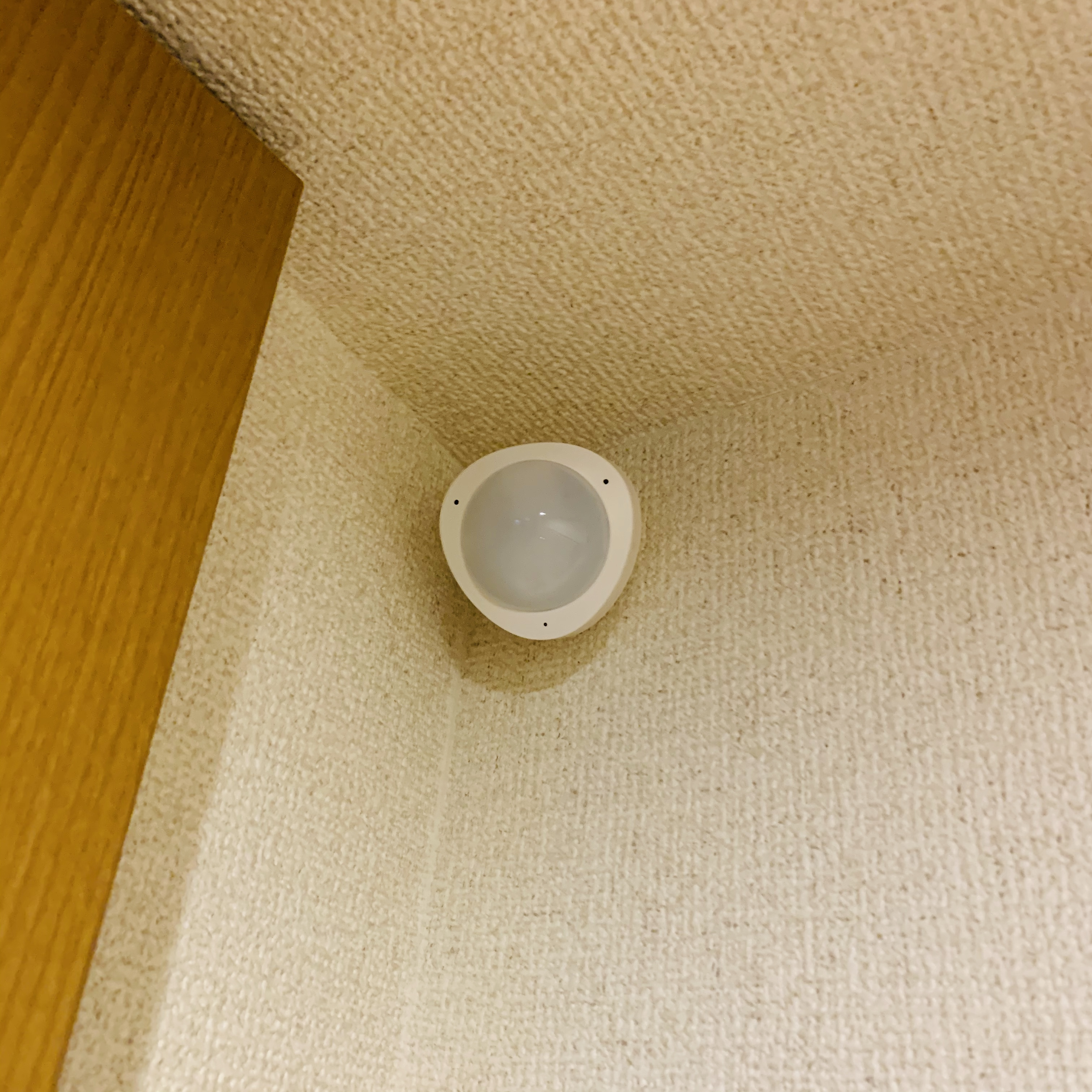 スマートセンサー（人感）